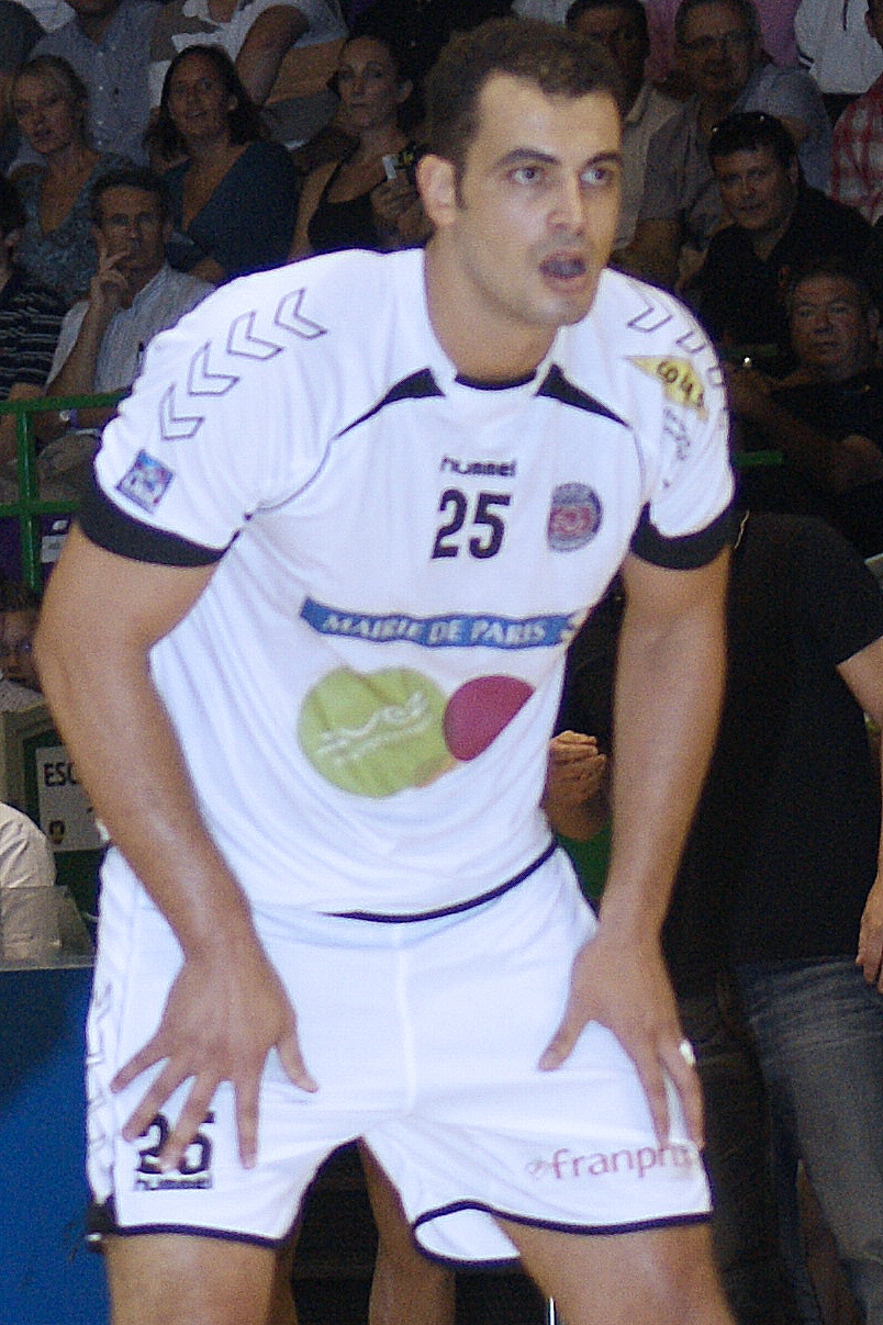 Belgacem Filah arrière gauche du Paris Handball le 30 septembre 2011, face au HBC Nantes.